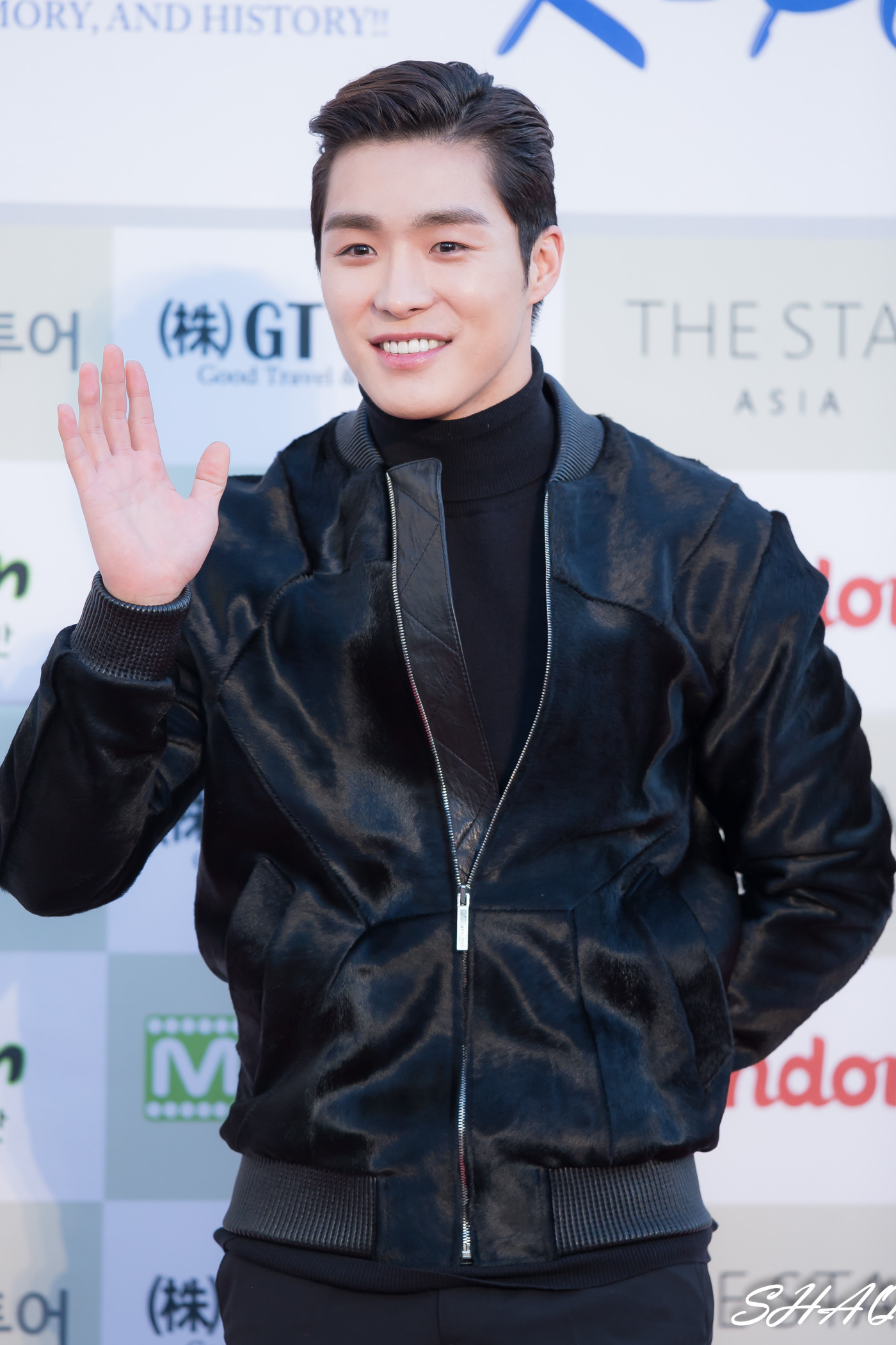 160217 가온차트 K-POP 어워드 레드카펫